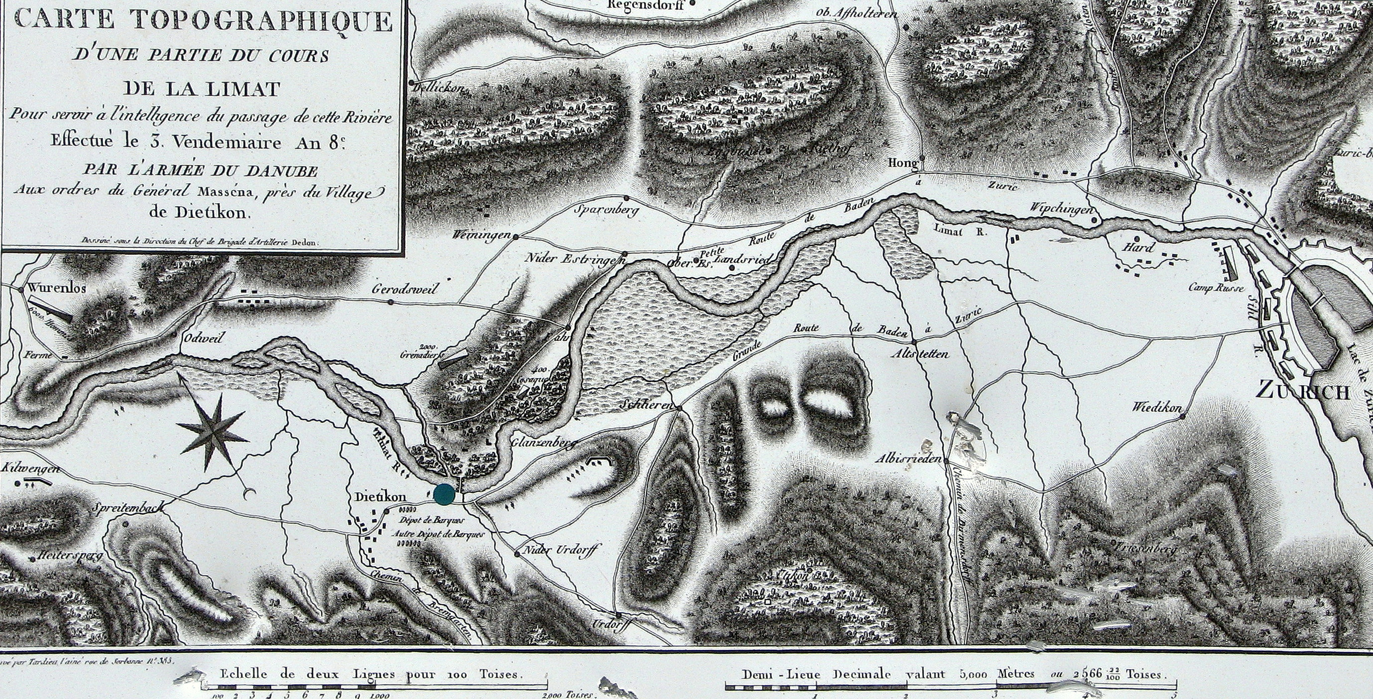 Zweite Schlacht von Zürich an der Limmat bei Dietikon: Karte aus DEDON, Relation detaillée du Passage de la Limat, Paris 1801.